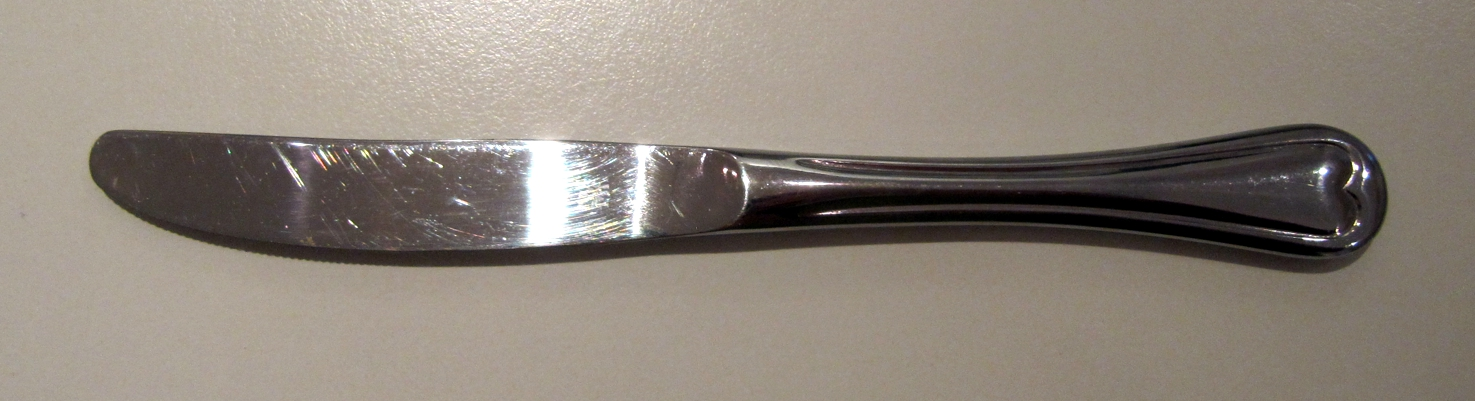 Buttermesser (WMF)